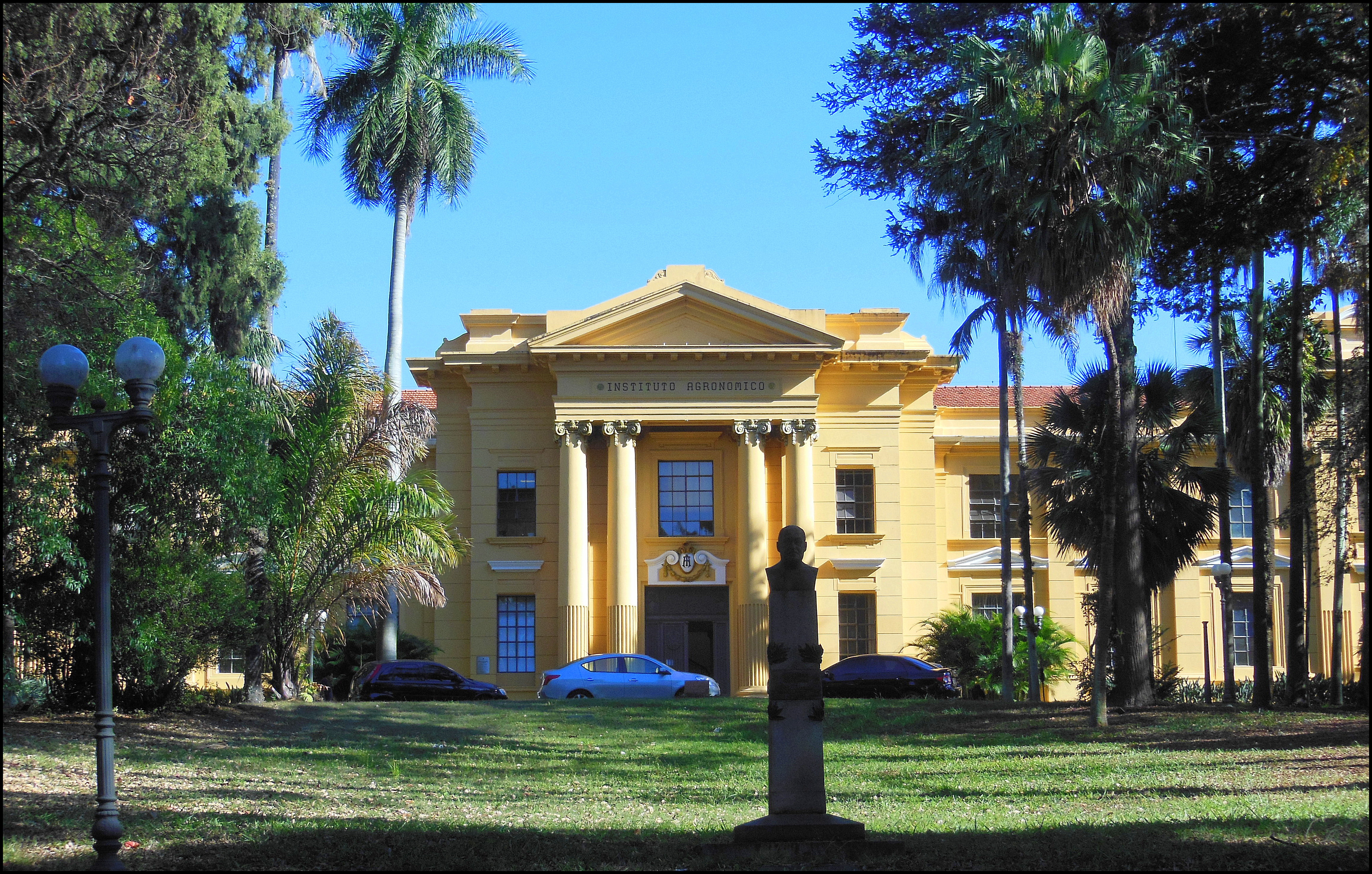 Instituto Agronômico de Campinas